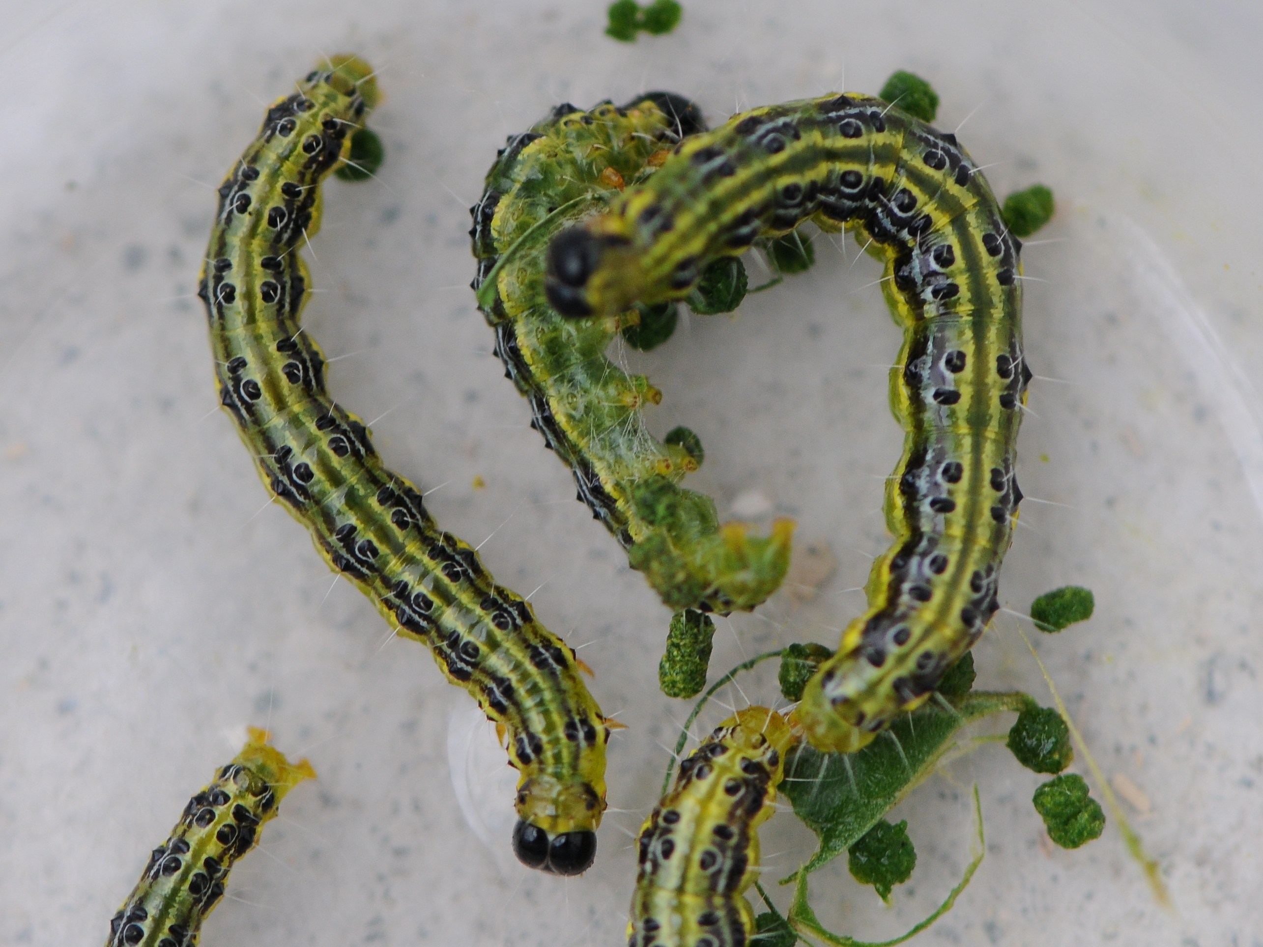 Raupe des Buchsbaumzünsler. Der Buchsbaumzünsler (Cydalima perspectalis) ist ein ostasiatischer Kleinschmetterling aus der Familie der Crambidae, der zu Beginn des 21. Jahrhunderts nach Mitteleuropa eingeschleppt wurde. *** Gesehen in Dornbirn.